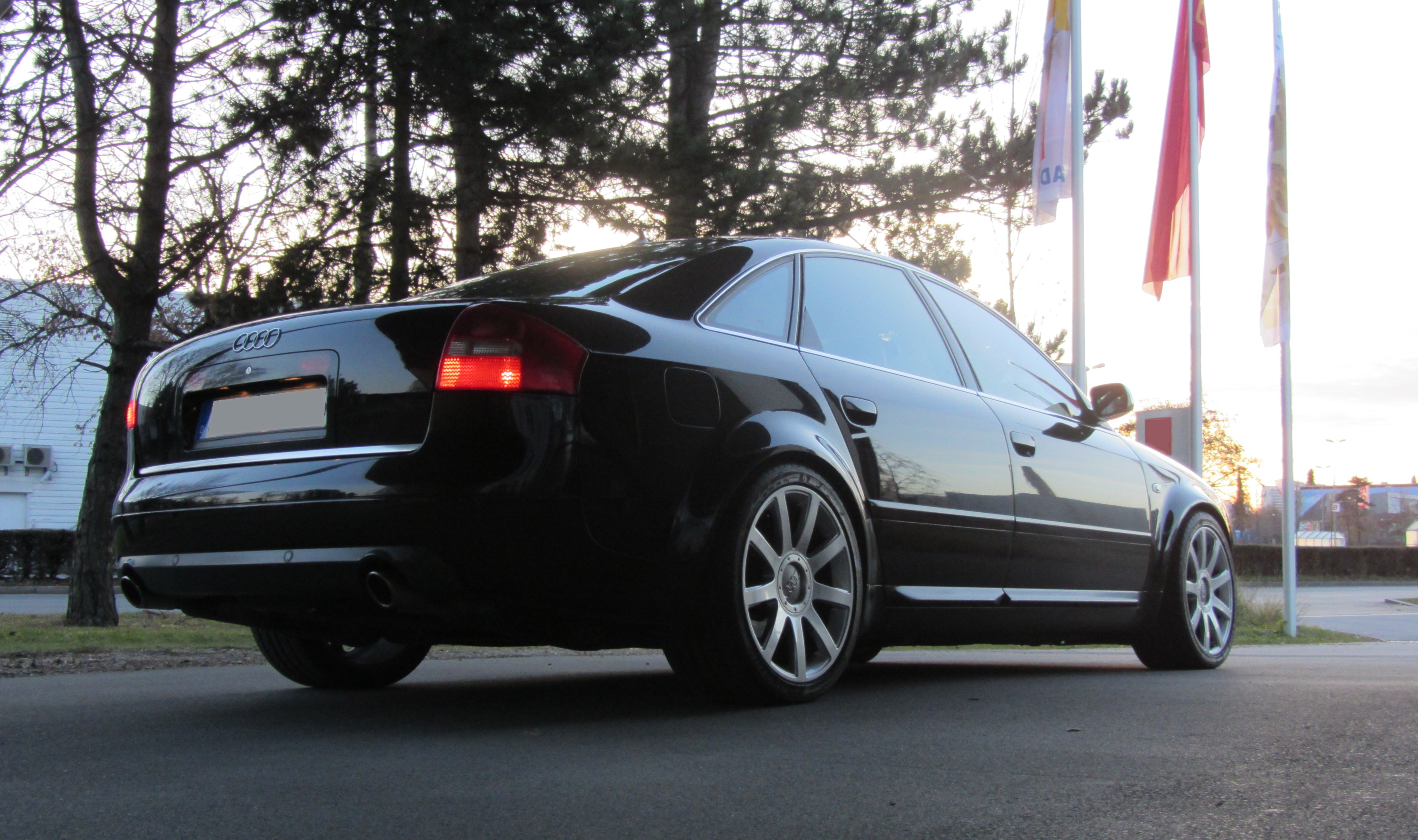 Audi S6 4.2 quattro Limousine Modelljahr 2002 (Facelift) Farbe: "brillantschwarz" mit ab Werk verfügbarer 18-Zoll Felge der quattro GmbH im 9-Speichen-Desing in 8,5 J x 18 und Reifen in 255/35 ZR 18